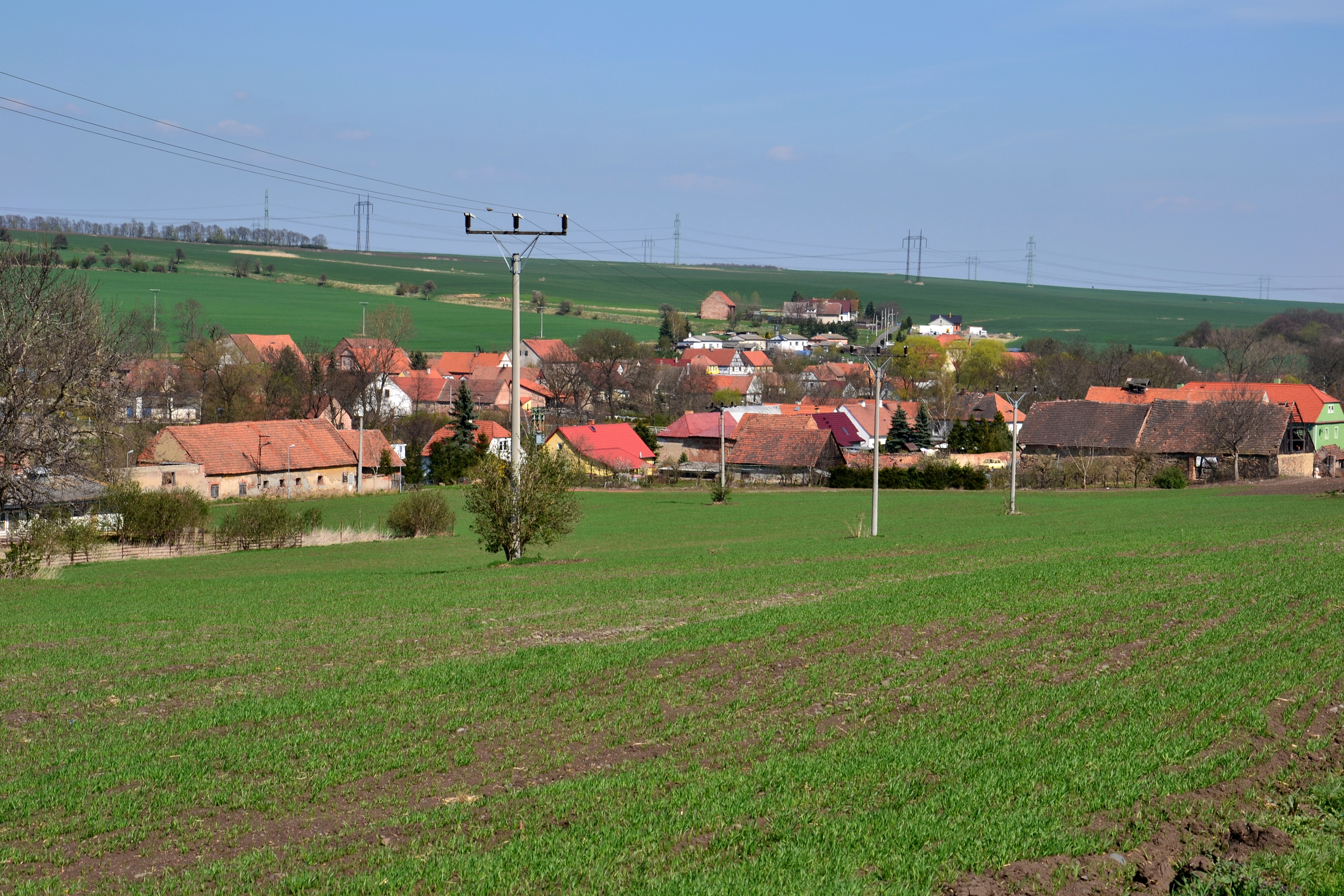 Celkový pohled na vesnici z jihozápadu